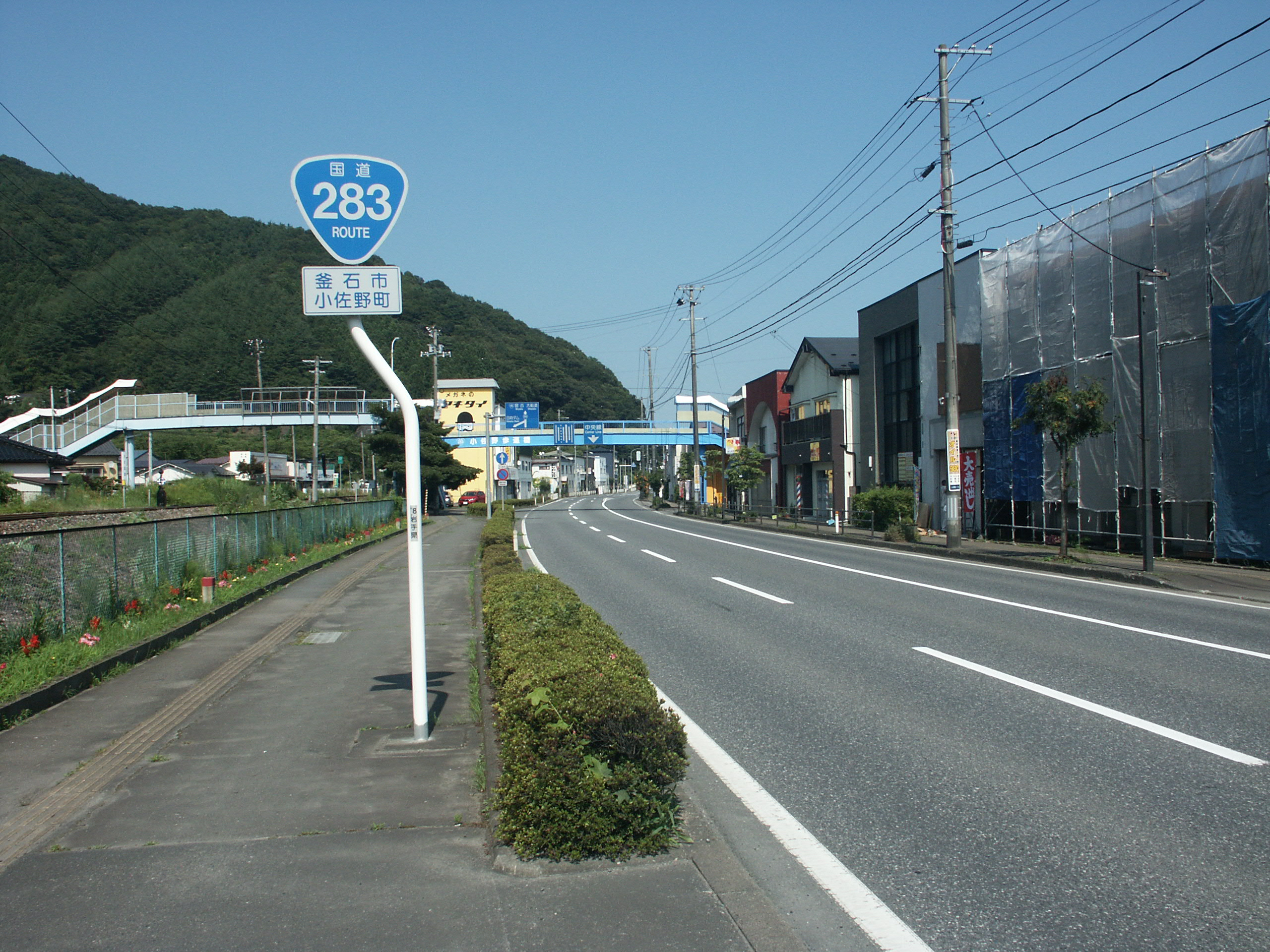 国道283号線岩手県釜石市小佐野町付近（釜石市街方面を撮影）